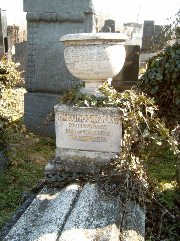 Kunos Ignác (Hajdúsámson; 1860. szept. 22. – Bp., 1945. jan. 12.): nyelvész, turkológus, az MTA l. tagjának (1893) sírja Budapesten. Kozma utcai zsidó temető: 5B-10-22.